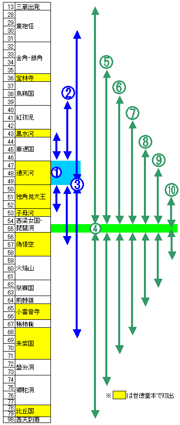 『西遊記』世徳堂本の対称構造の説明